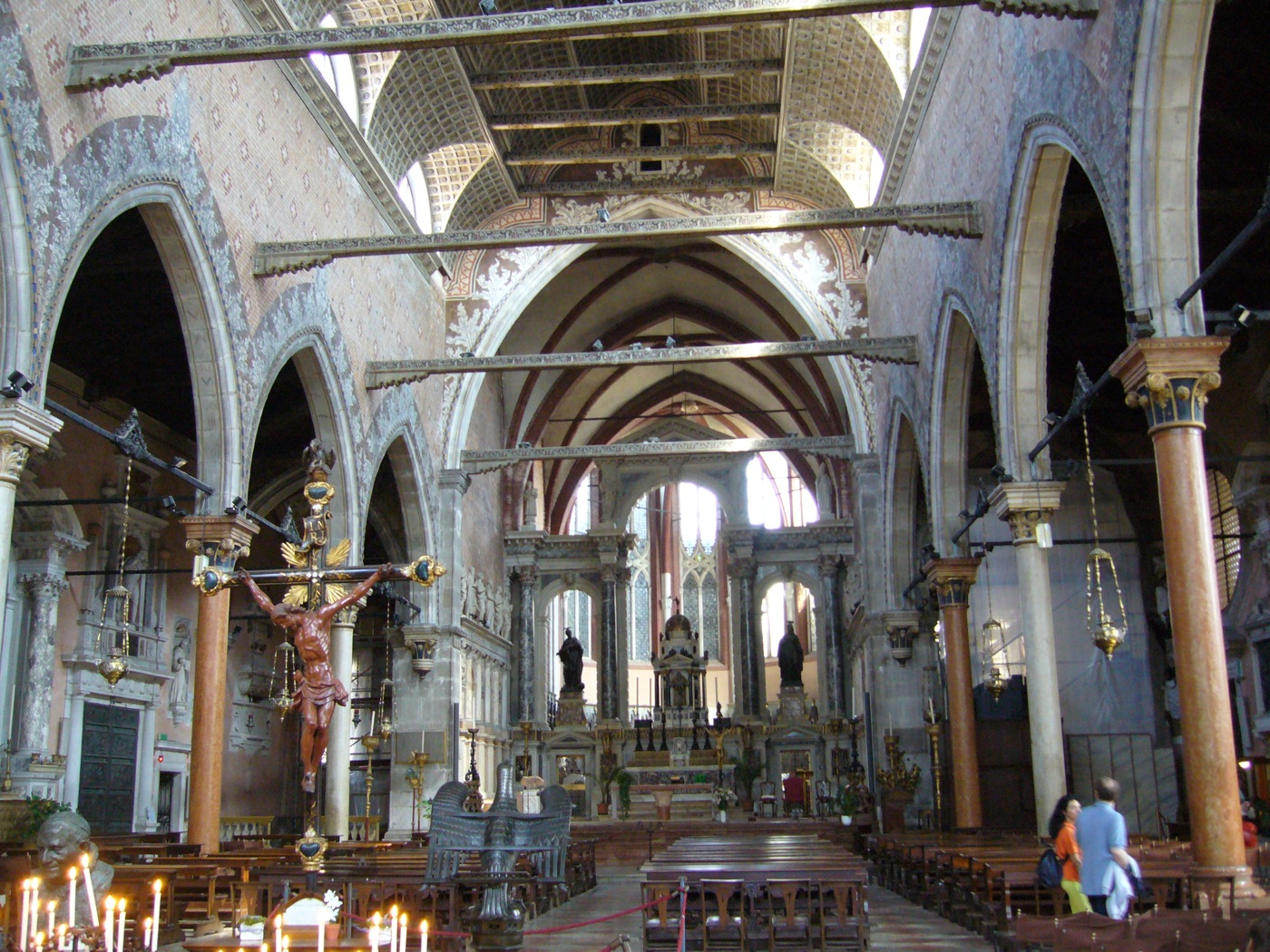 L'interno della chiesa di Santo Stefano a Venezia, Italia.